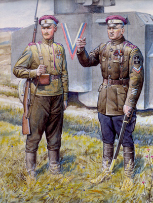 Картина "Дроздовцы".